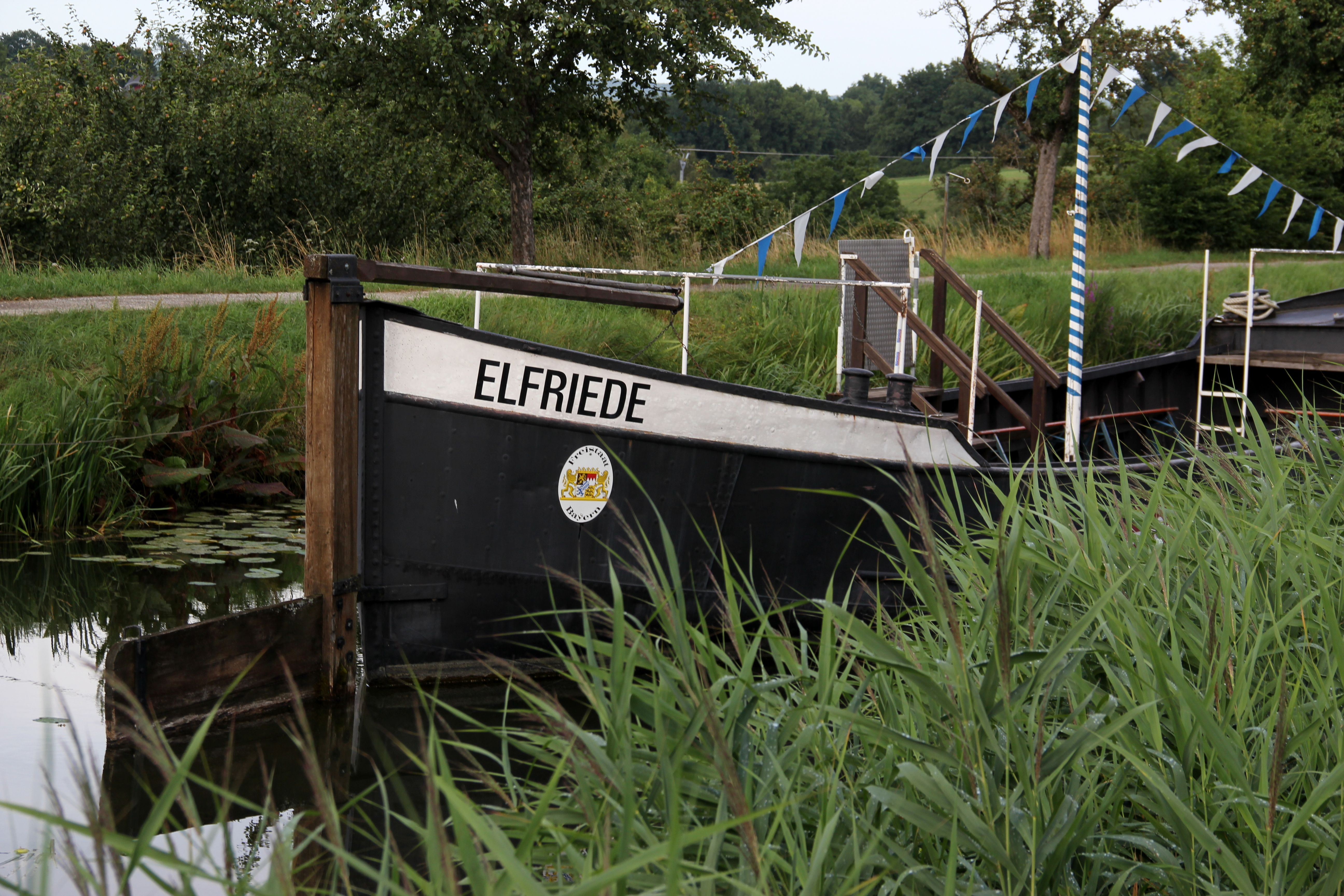 Schwarzenbach, Kanal, Elfriede